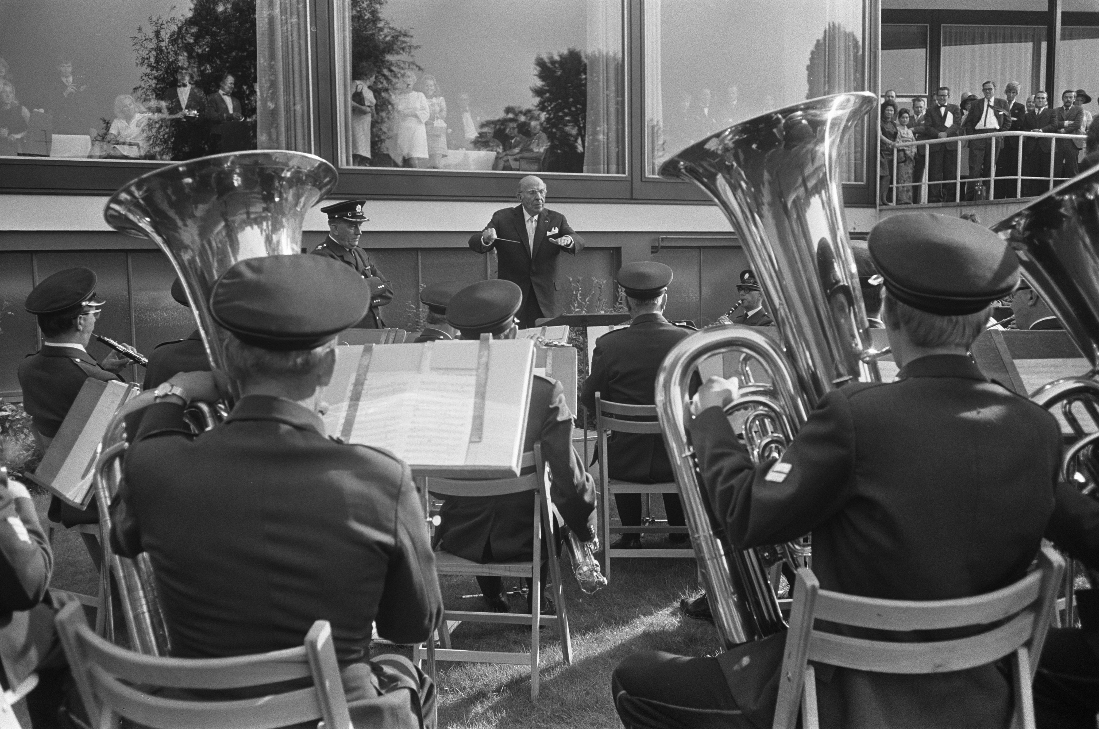 Collectie / Archief : Fotocollectie Anefo Reportage / Serie : [ onbekend ] Beschrijving : Gouden plaat voor Robert Stolz en Hilton Hotel Amsterdam Robert Stolz dirigeert Amsterdamse Politiekapel Datum : 8 september 1969 Locatie : Amsterdam, Noord-Holland Trefwoorden : dirigenten, hotels, kapels Persoonsnaam : Stolz, Robert Instellingsnaam : Hilton Hotel Fotograaf : Koch, Eric / Anefo Auteursrechthebbende : Nationaal Archief Materiaalsoort : Negatief (zwart/wit) Nummer archiefinventaris : bekijk toegang 2.24.01.05 Bestanddeelnummer : 922-7708